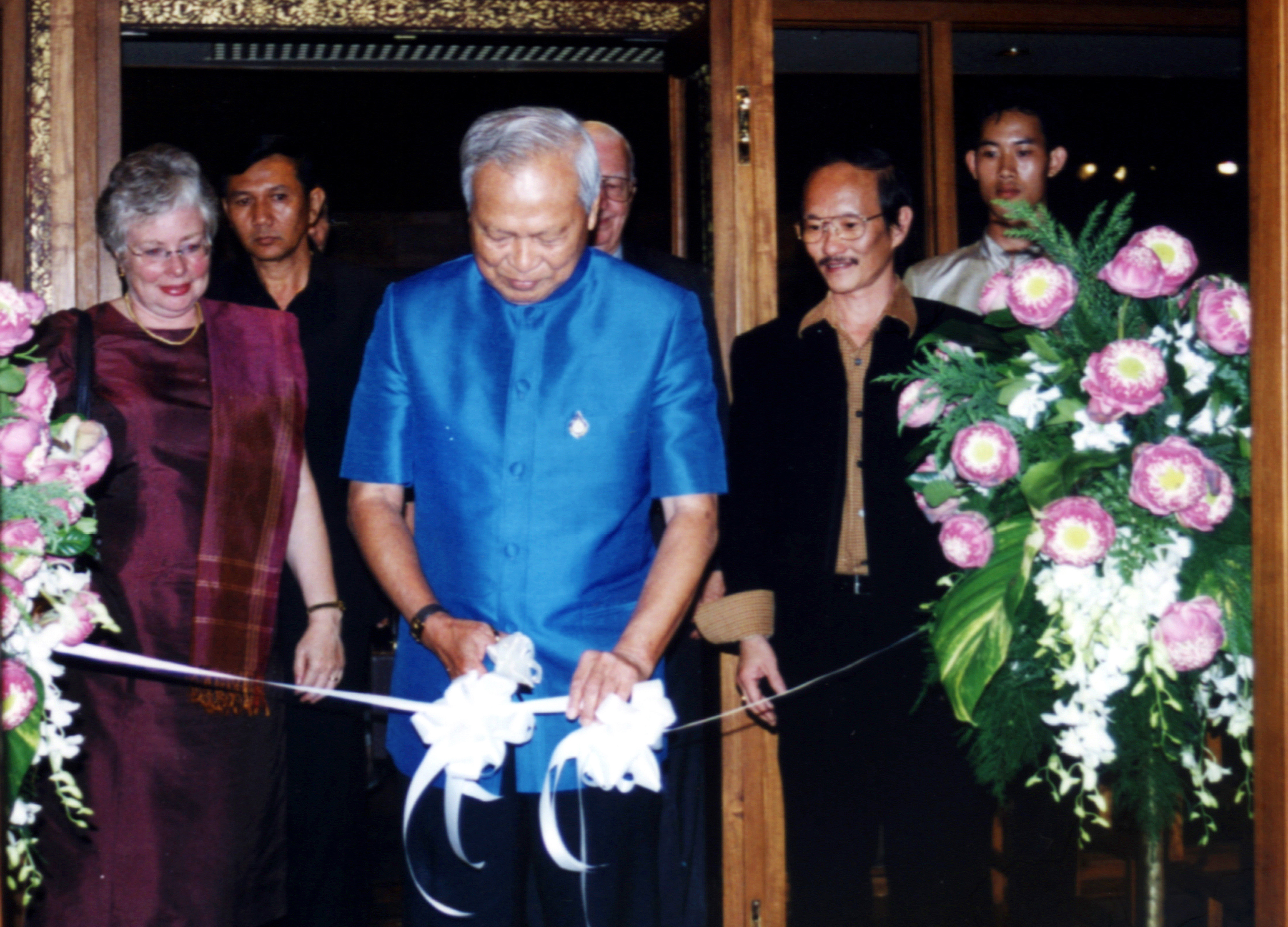 ฯพณฯ พลเอกเปรม ติณสูลานนท์ ประธานองคมนตรี และรัฐบุรุษ ให้เกียรติเป็นประธาน เปิดงานนิทรรศการภาพวาดสีน้ำ และหนังสือ “Thailand Sketchbook” ในวันที่ 5 กันยายน พ.ศ. 2545